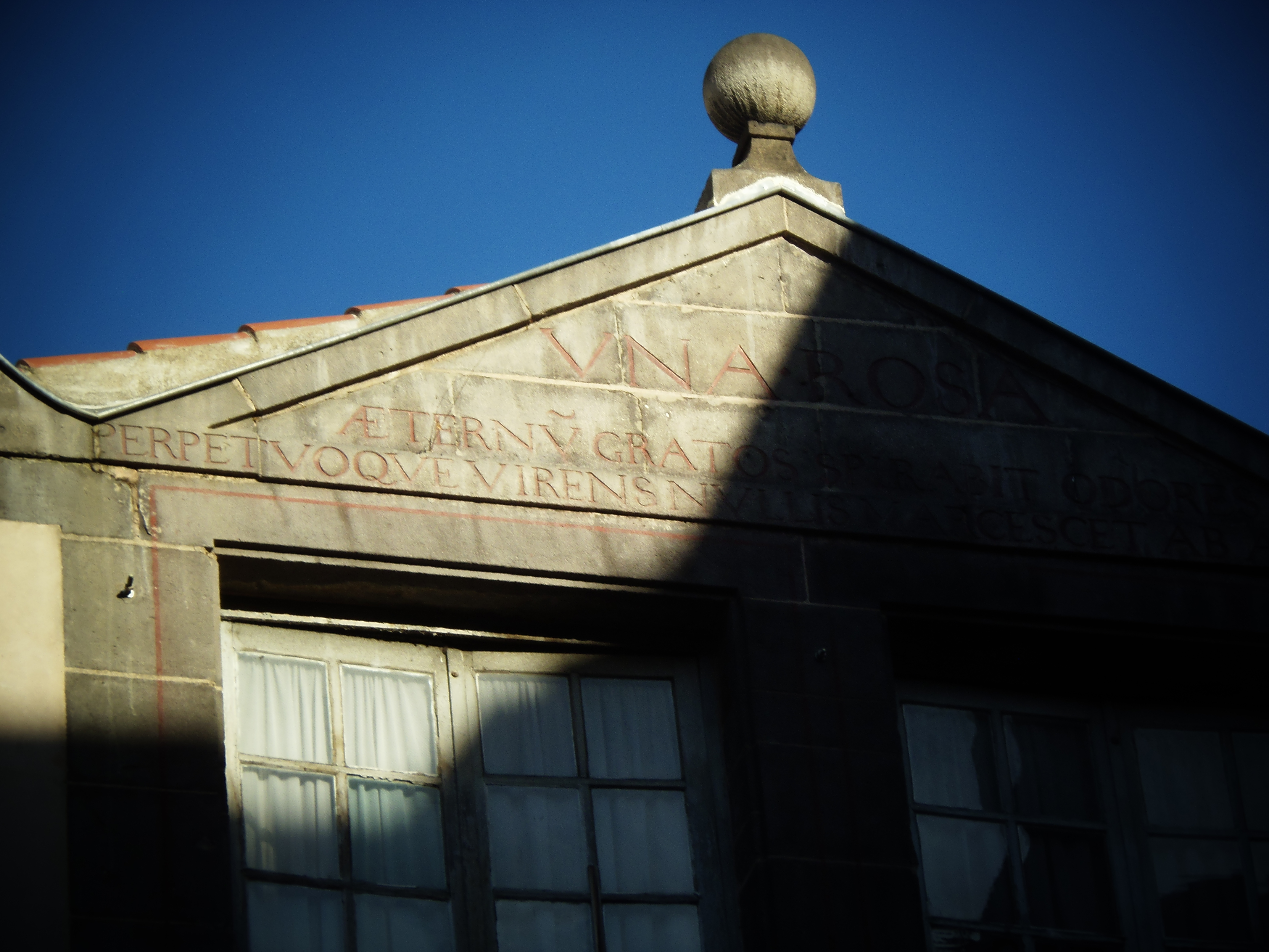 Clermont-Ferrand, France. Maison de Jean Savaron, place du Terrail. A ne pas confondre avec l'hôtel Savaron. Inscription « VNA ROSA ÆTERNṼ GRATOS SPIRABIT ODORES PERPETVQVE VIRENS NVLLIS MARCESCET AB ANNIS »